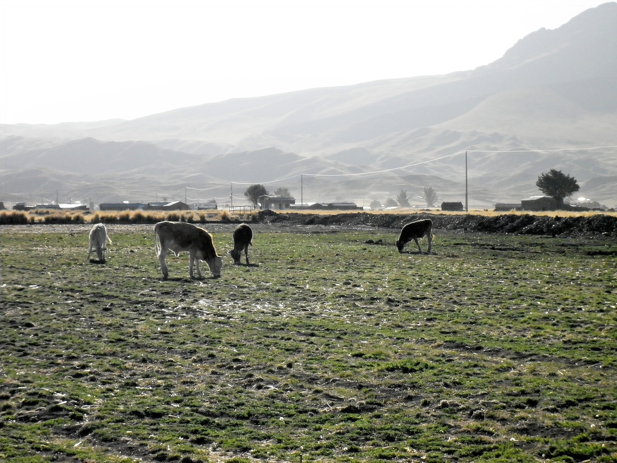 Ganderia en la localidad de Mañazo.